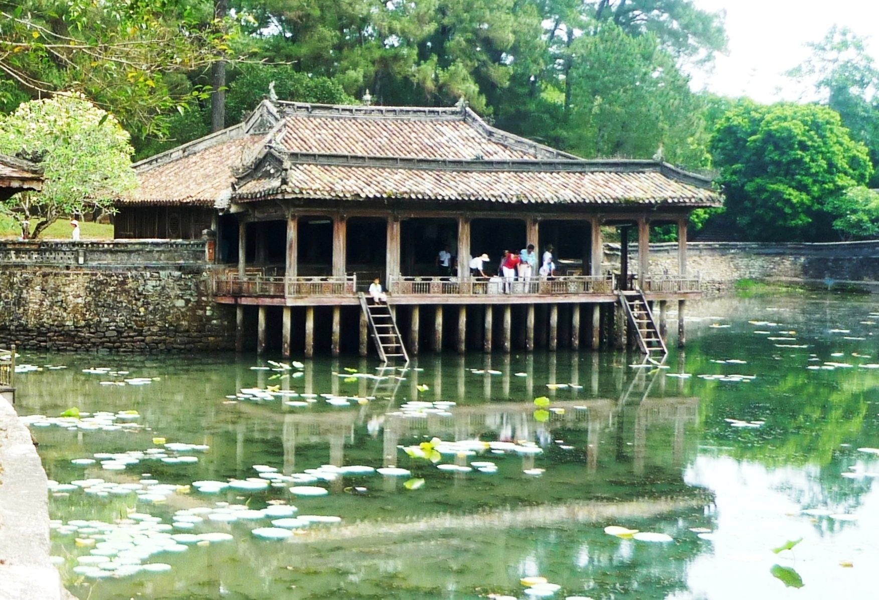 Thể Loại:Di tích cố đô Huế Thể loại:Lăng tẩm các Vua chúa Nguyễn Thể loại:Di tích ngoài Kinh Thành Huế